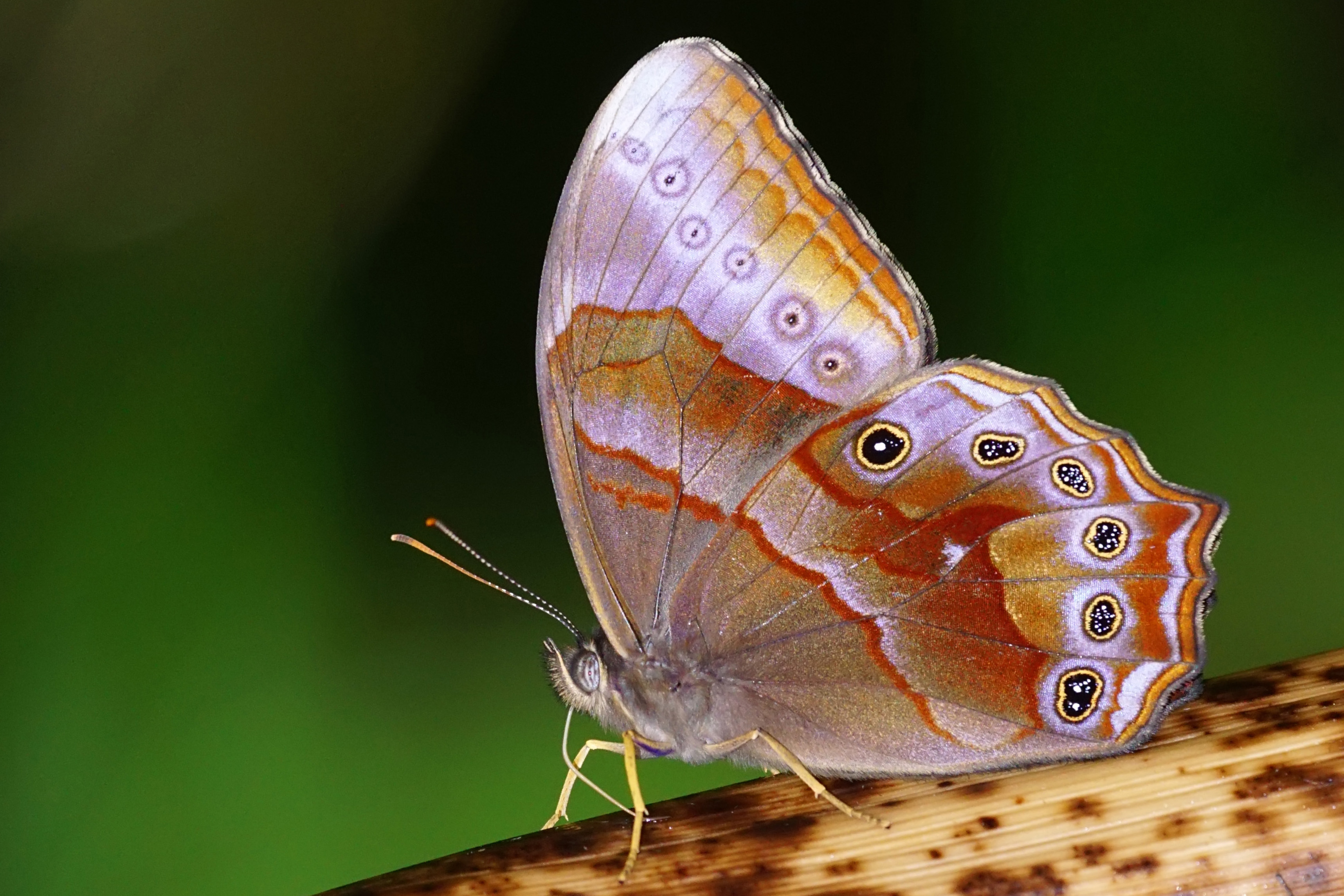 曲紋黛眼蝶 Lethe chandica ratnacri